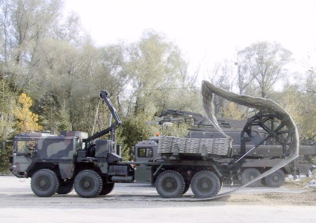 Faltstraßengerät im Einsatz Ich habe das Foto im Oktober 2003 selbst aufgenommen. Es steht unter der FDL. MatthiasKabel 11:14, 10. Jun 2004 (CEST)